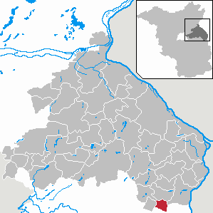 Treplin in Brandenburg (Country) - District Märkisch-Oderland